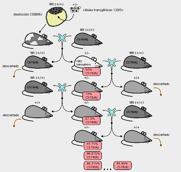 Diagrama exemplificativo da lógica do retrocruzamento.